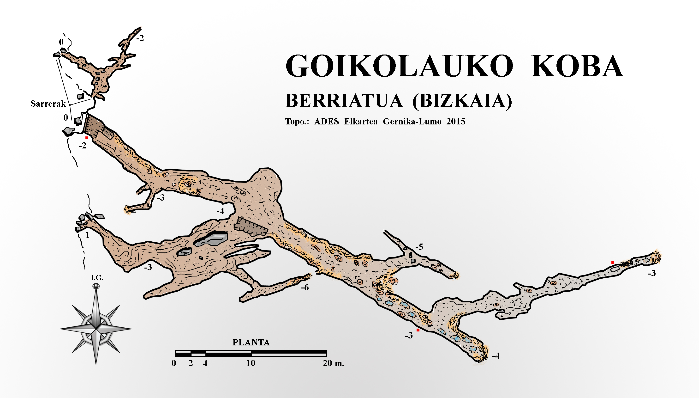 Goikolauko koba (Berriatua, Bizkaia). 2015 urtean eginiko plano topografikoa.